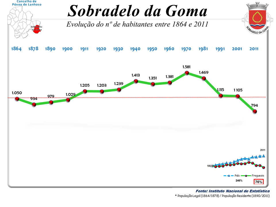 Censos 1864/2011